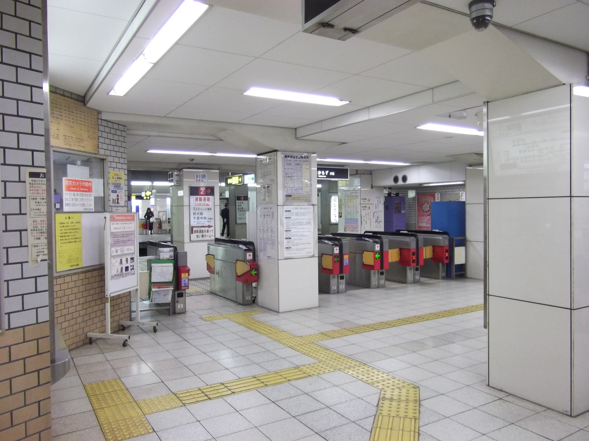 御堂筋線西田辺駅下りホームの改札口